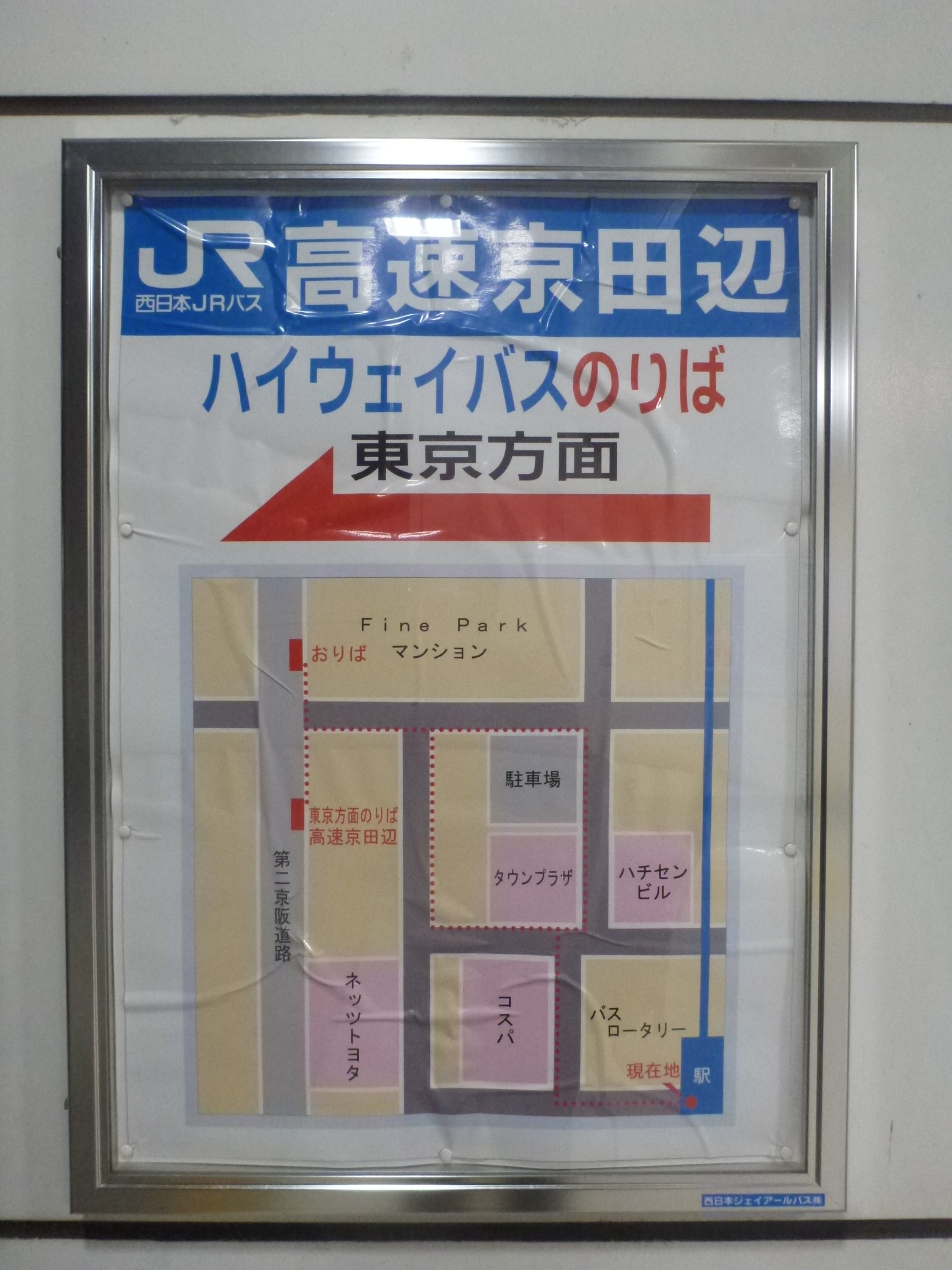 松井山手駅前に掲示されている第二京阪道路高速京田辺バスストップへの案内板